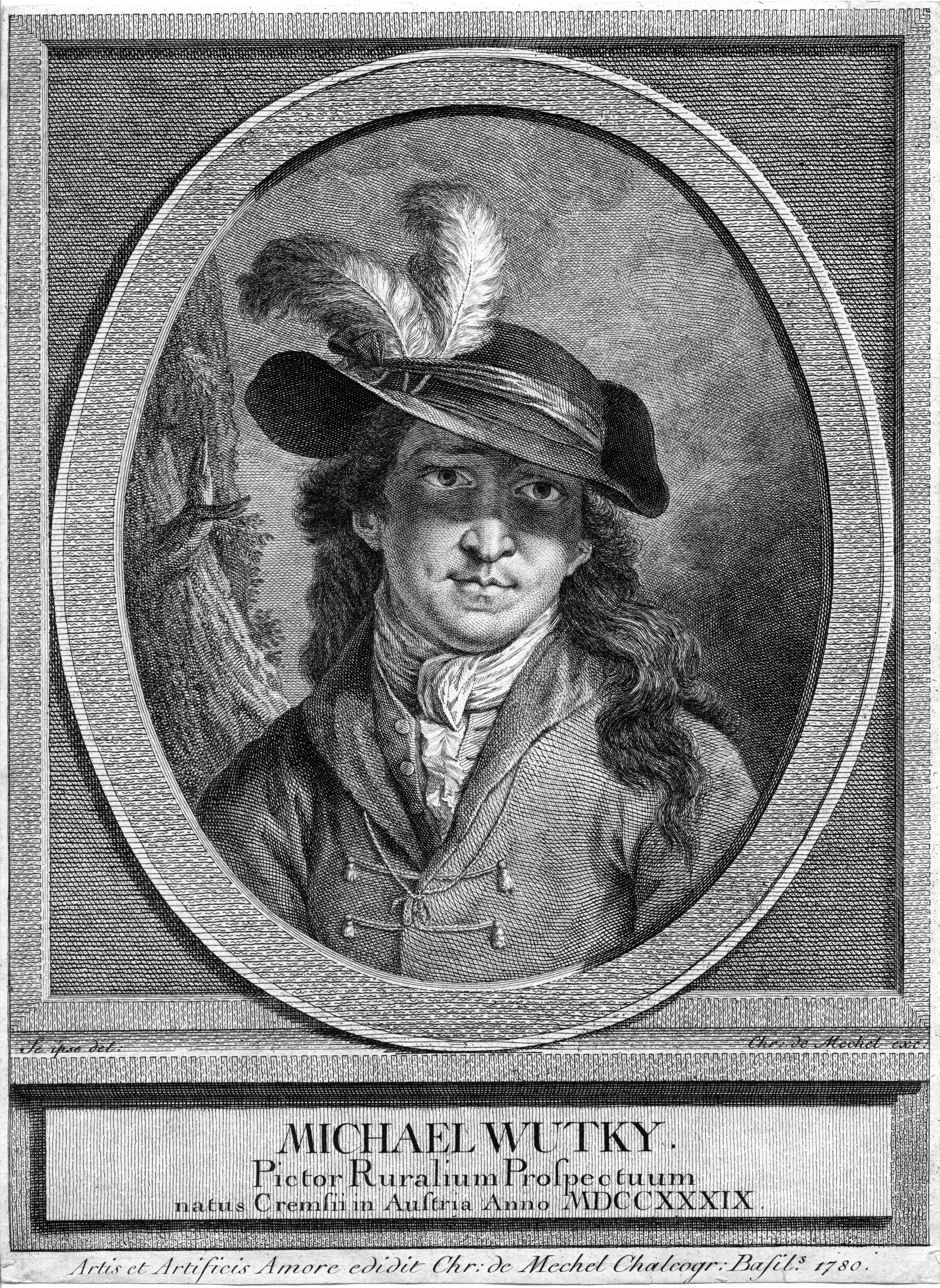 portrait gravé